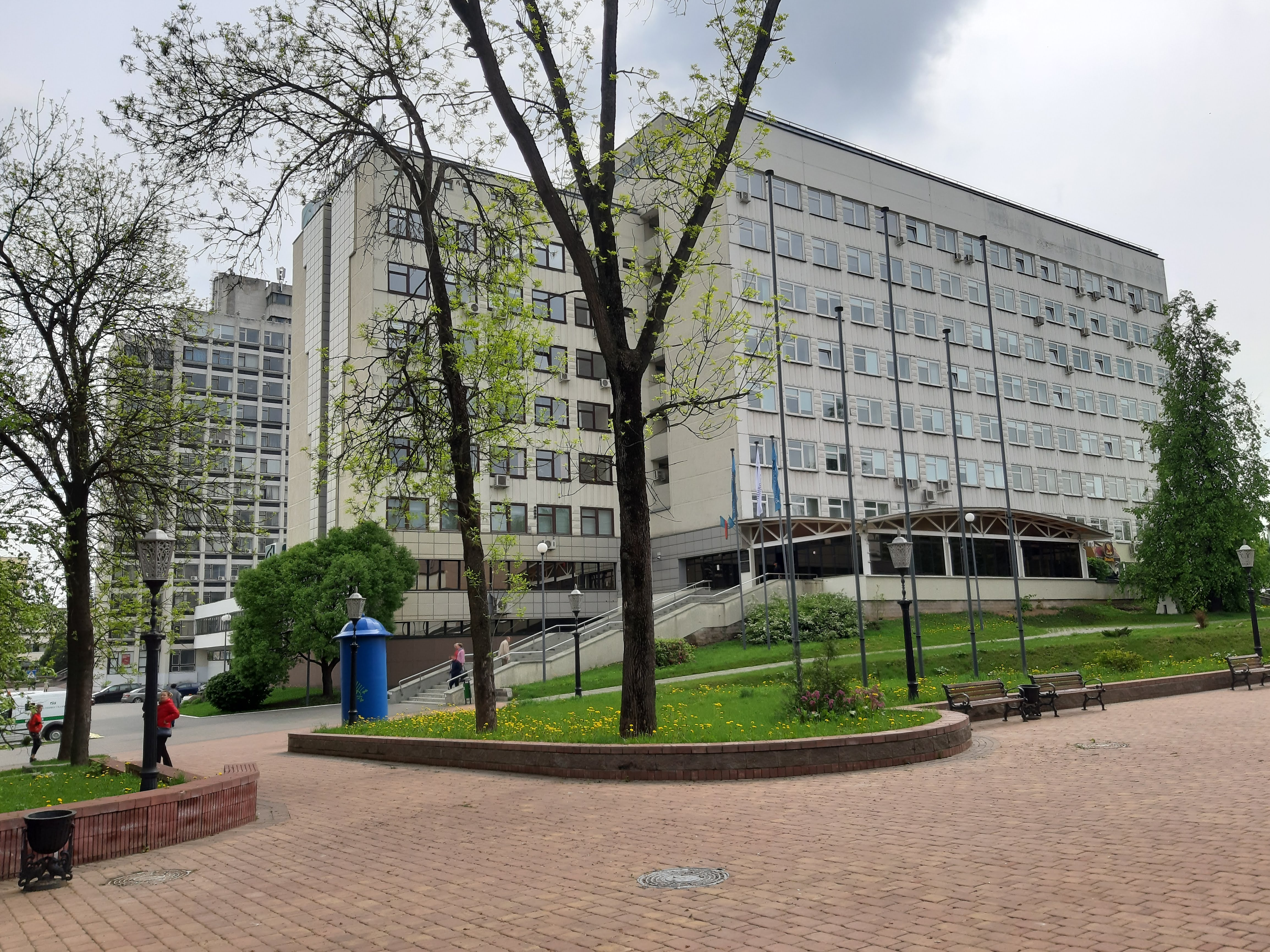 Мінск. Старажоўка